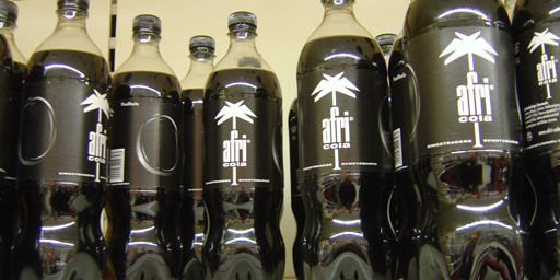 Afri-Cola, German beverage